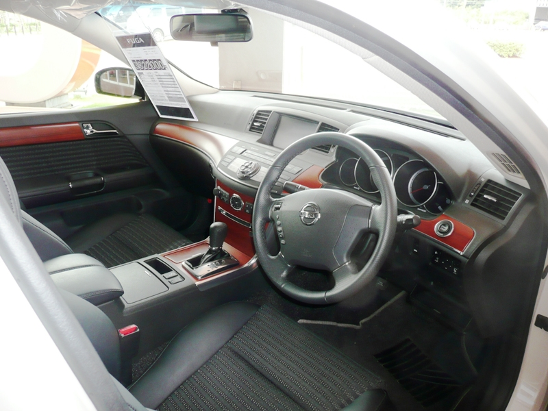 Nissan Fuga interior.